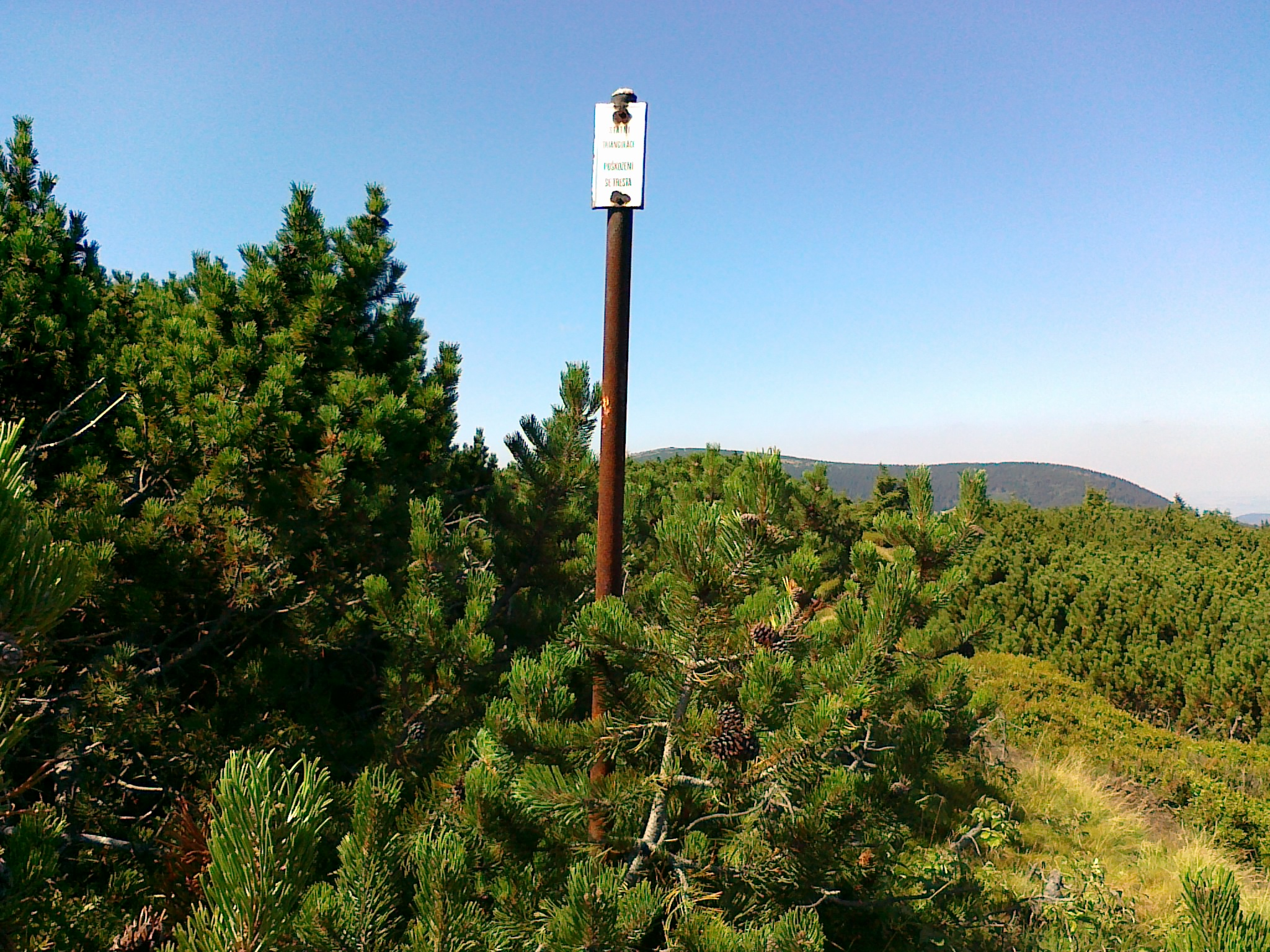 Punkt geodezyjny przy żółtym szlaku turystycznym blisko szczytu góry Červená hora - 1333 m